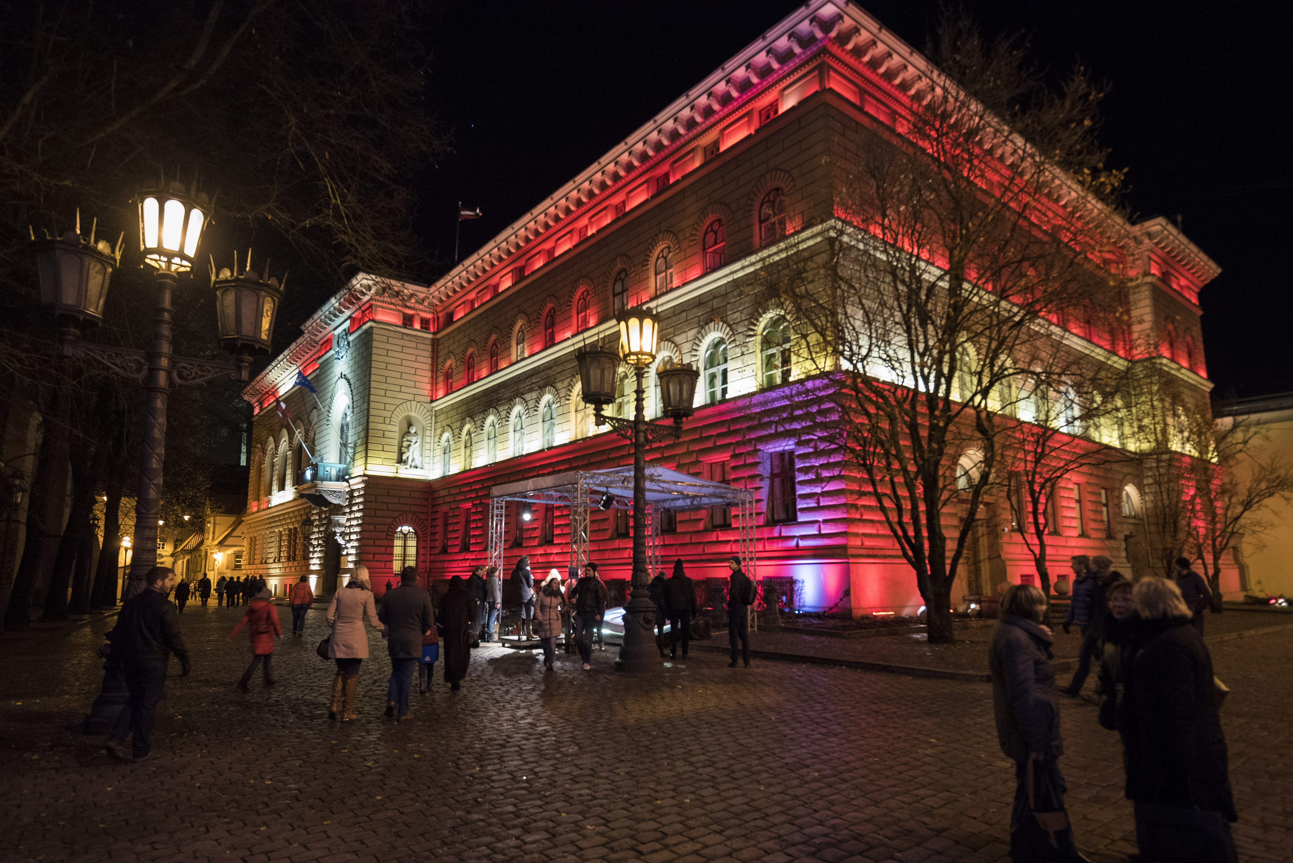 2015.gada 19.novembris. Saeima festivāla „Staro Rīga 2015” līdzdalības akcijā piedāvā audiovizuālu stāstu “Brīvības ceļš”, aicinot pasākuma apmeklētājus interaktīvā grāmatā pāršķirstīt mūsu valsts jaunāko laiku vēstures lappuses. Foto: Reinis Inkēns, Saeimas Administrācija Izmantošanas noteikumi: saeima.lv/lv/autortiesibas